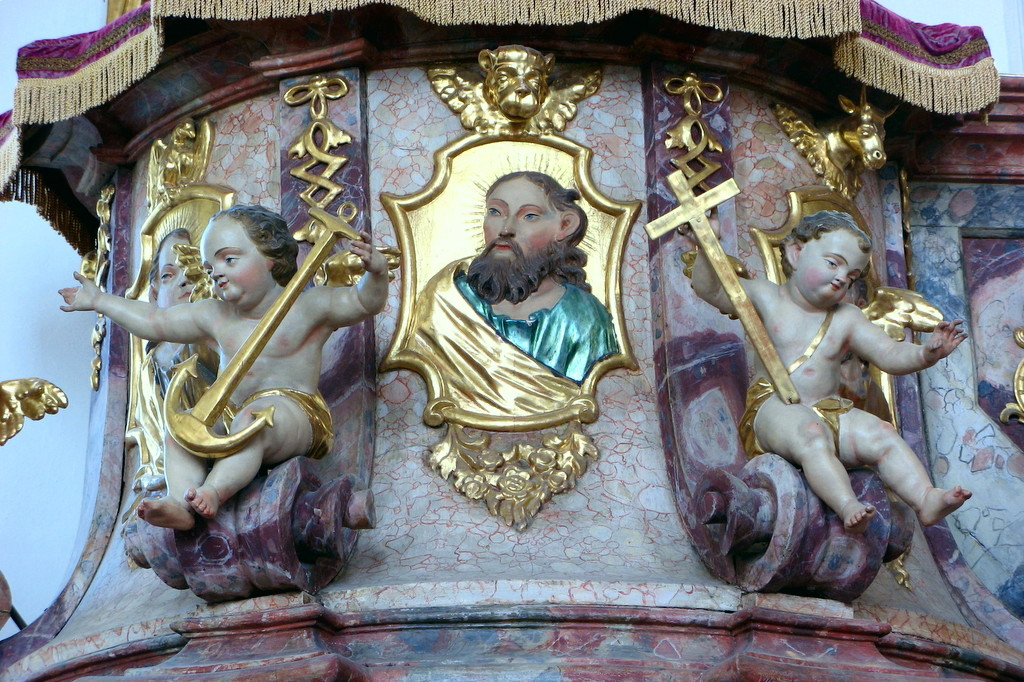 Kanzelplastik von Melchior Eberhard in der Kirche von Schöllang (Oberallgäu)